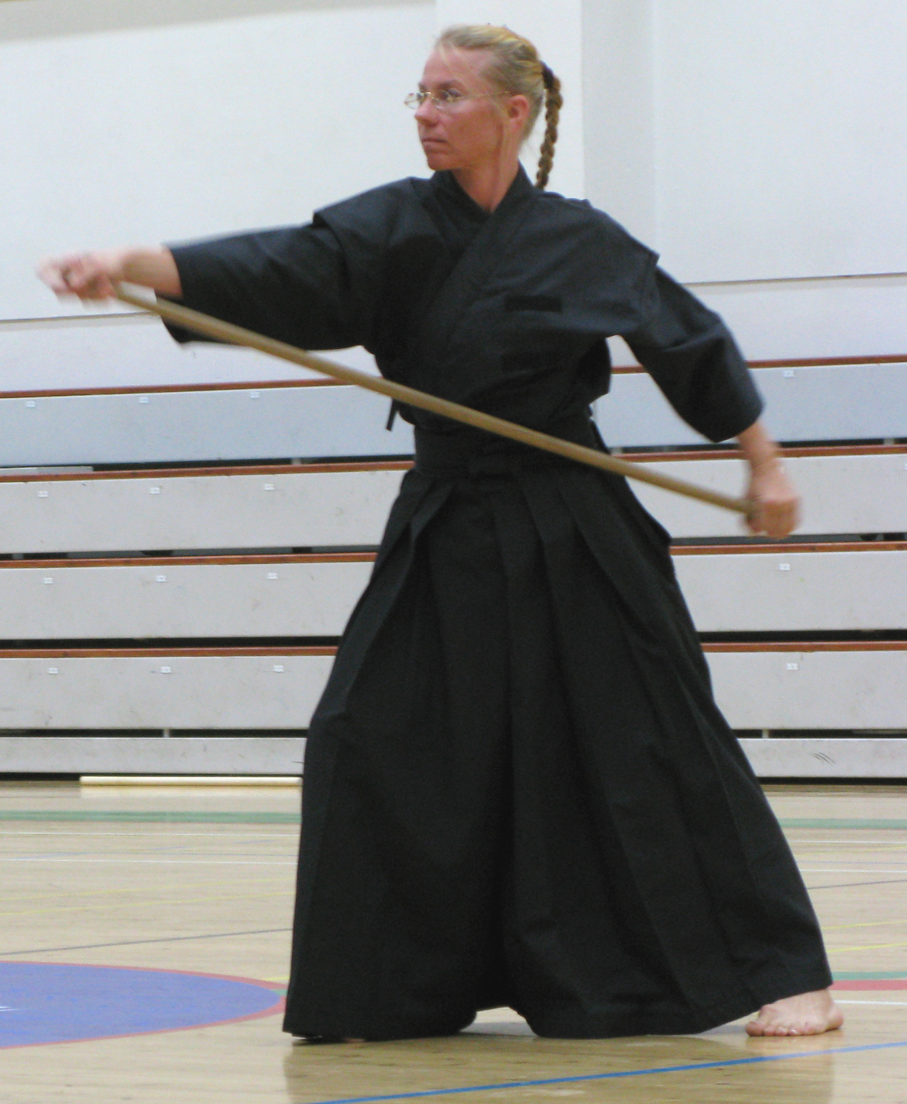 Jo sauvan käsittelyä